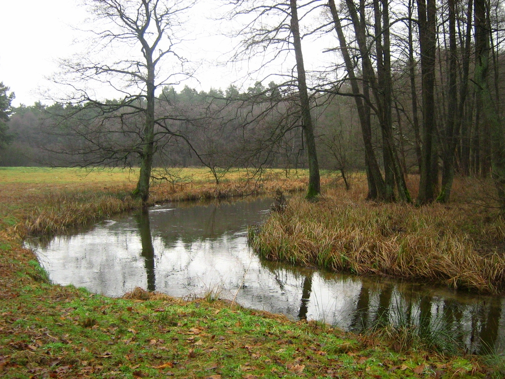 Der Rheinberger Rhin bei Zechow, einem Gemeindeteil der Stadt Rheinsberg. Der Rhin fließt hier nuturbelassen als mäandrierender Wildwasserbach in seinem schmalen Tal. Das Tal ist mit Schwarzerlenwäldern bewachsen, hat jedoch auch als Grünland genutzte Wiesenstücke. Die Flächen jenseits der nicht sehr hohen Flußterrasse sind mit Kiefern-Laubbaum-Mischwald bewaldet. (Landkreis Ostprignitz-Ruppin, Brandenburg)